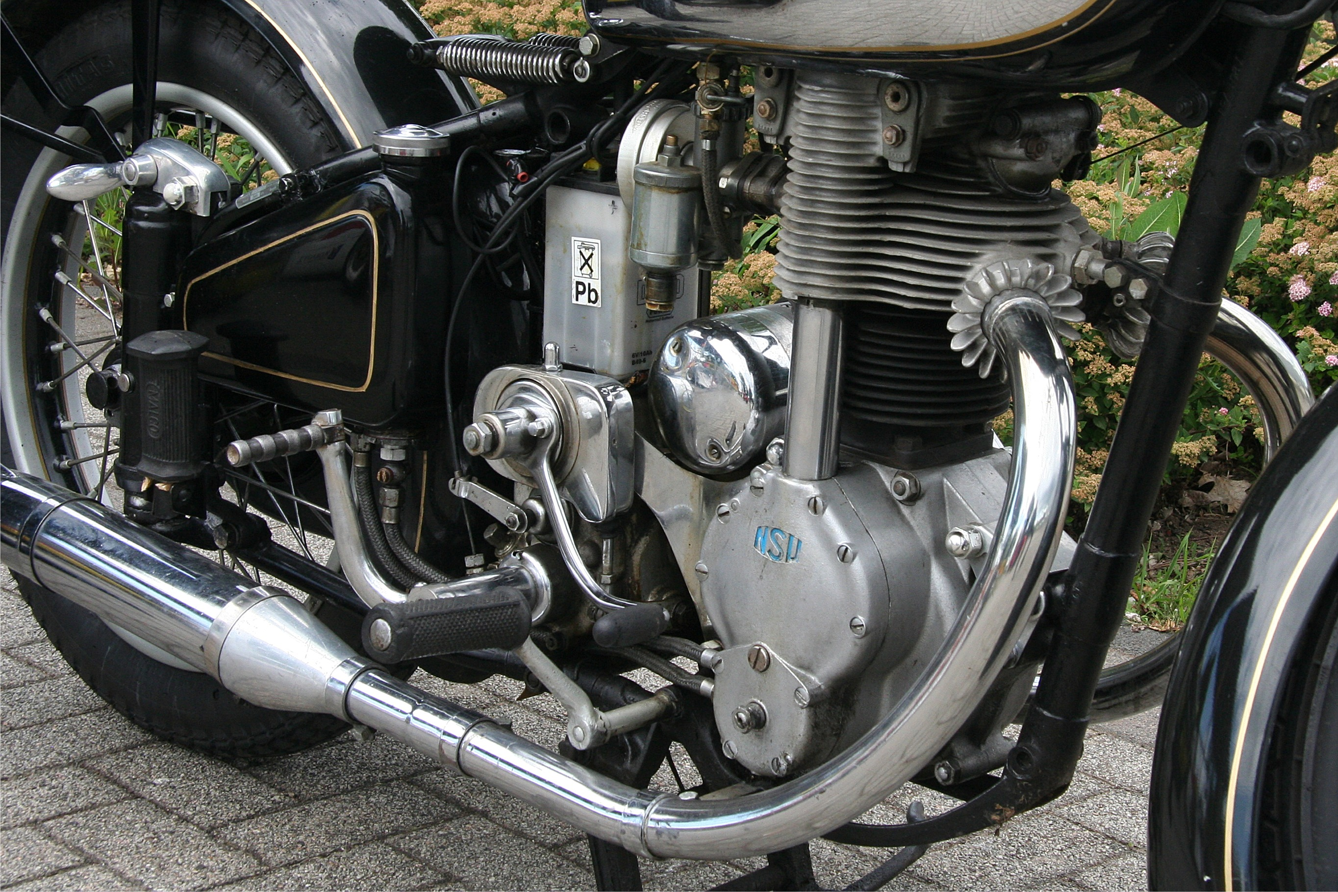 NSU Konsul I, Baujahr 1952, Fahrgestell-Nr. 1808 751, Motor und Getriebe